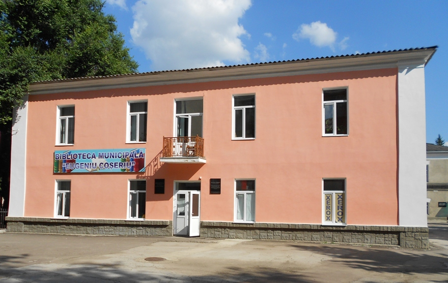 Biblioteca "Eugeniu Coșeriu" din municipiul Bălți